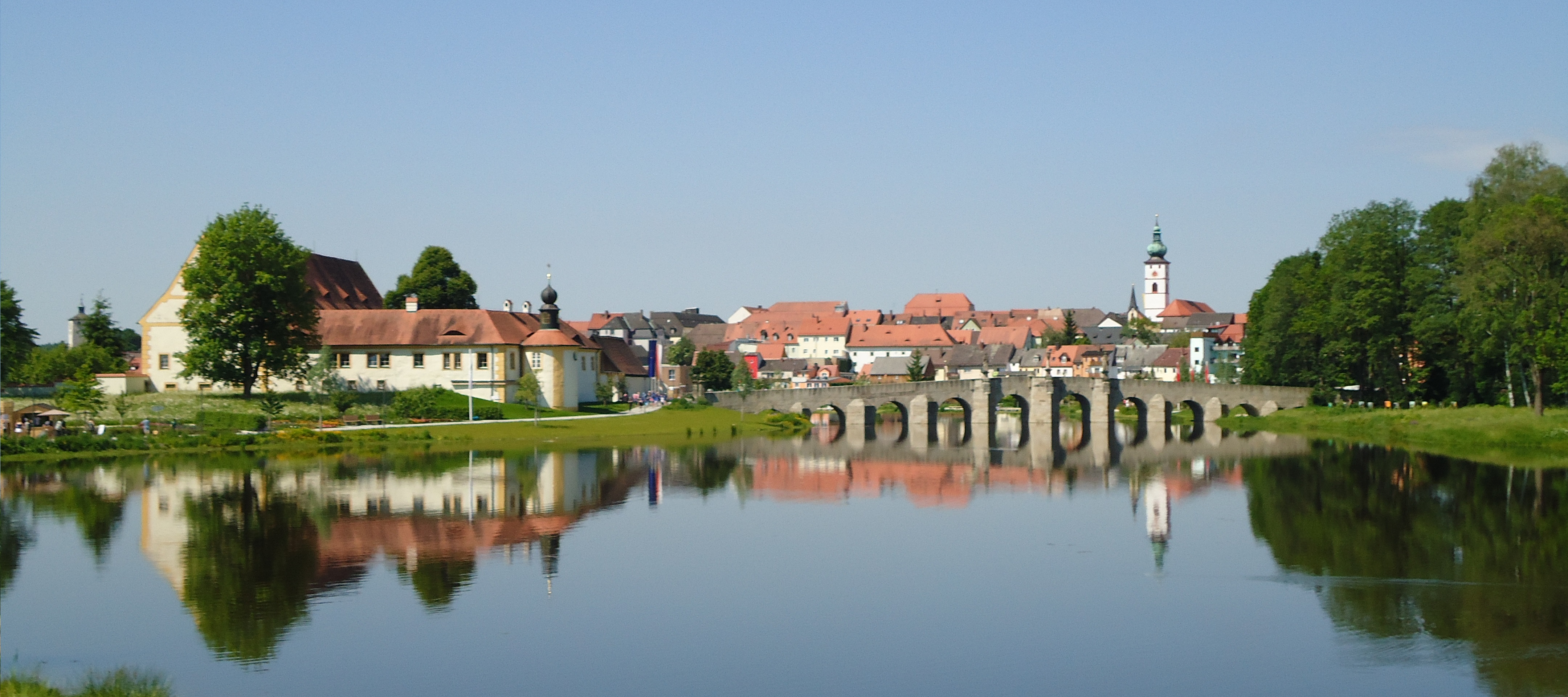 Tirschenreuth, Panorama